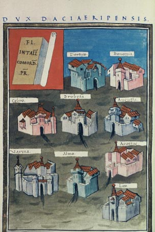 Dux Daciae ripensis from Notitia dignitatum